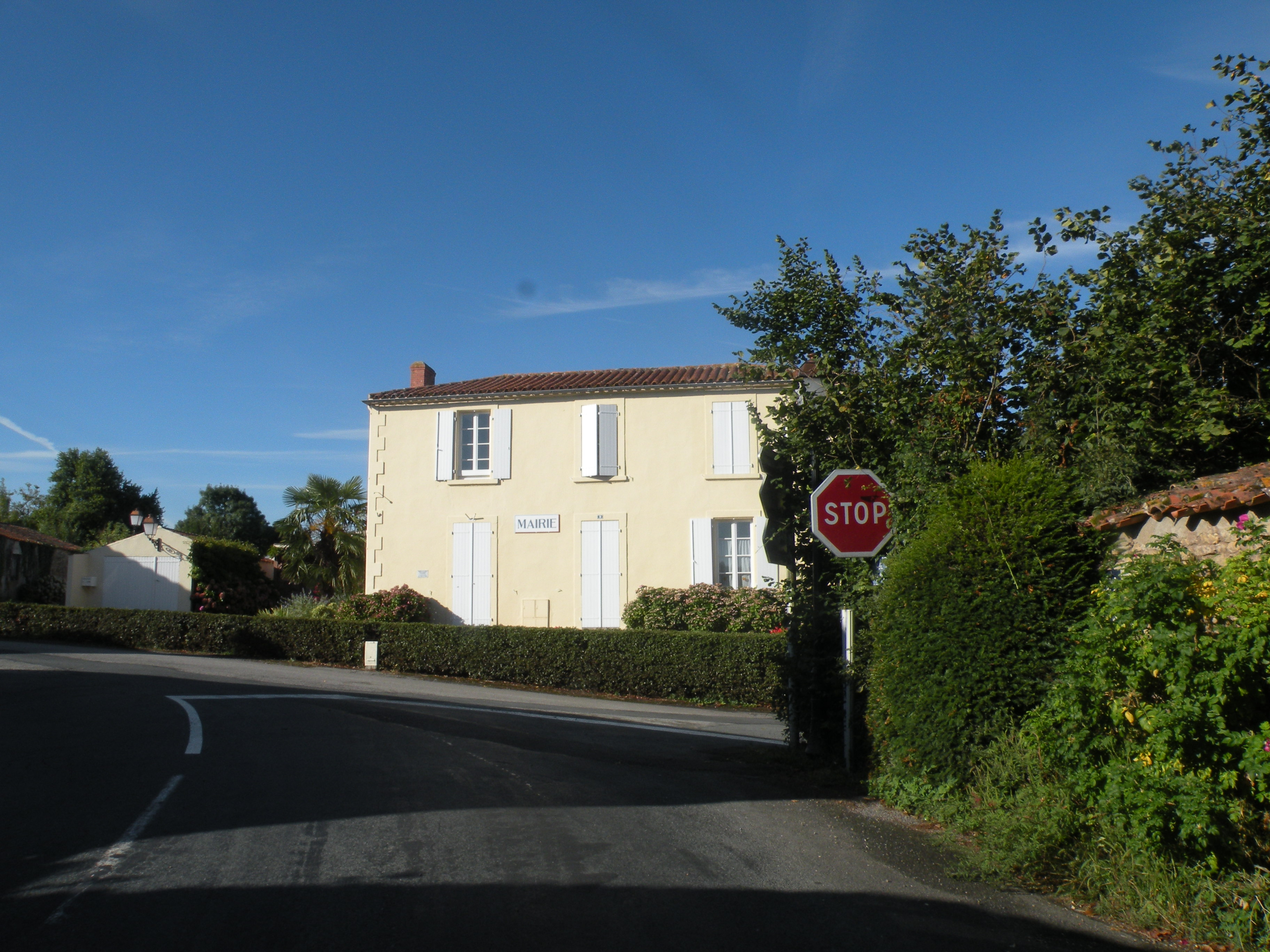 Le Givre